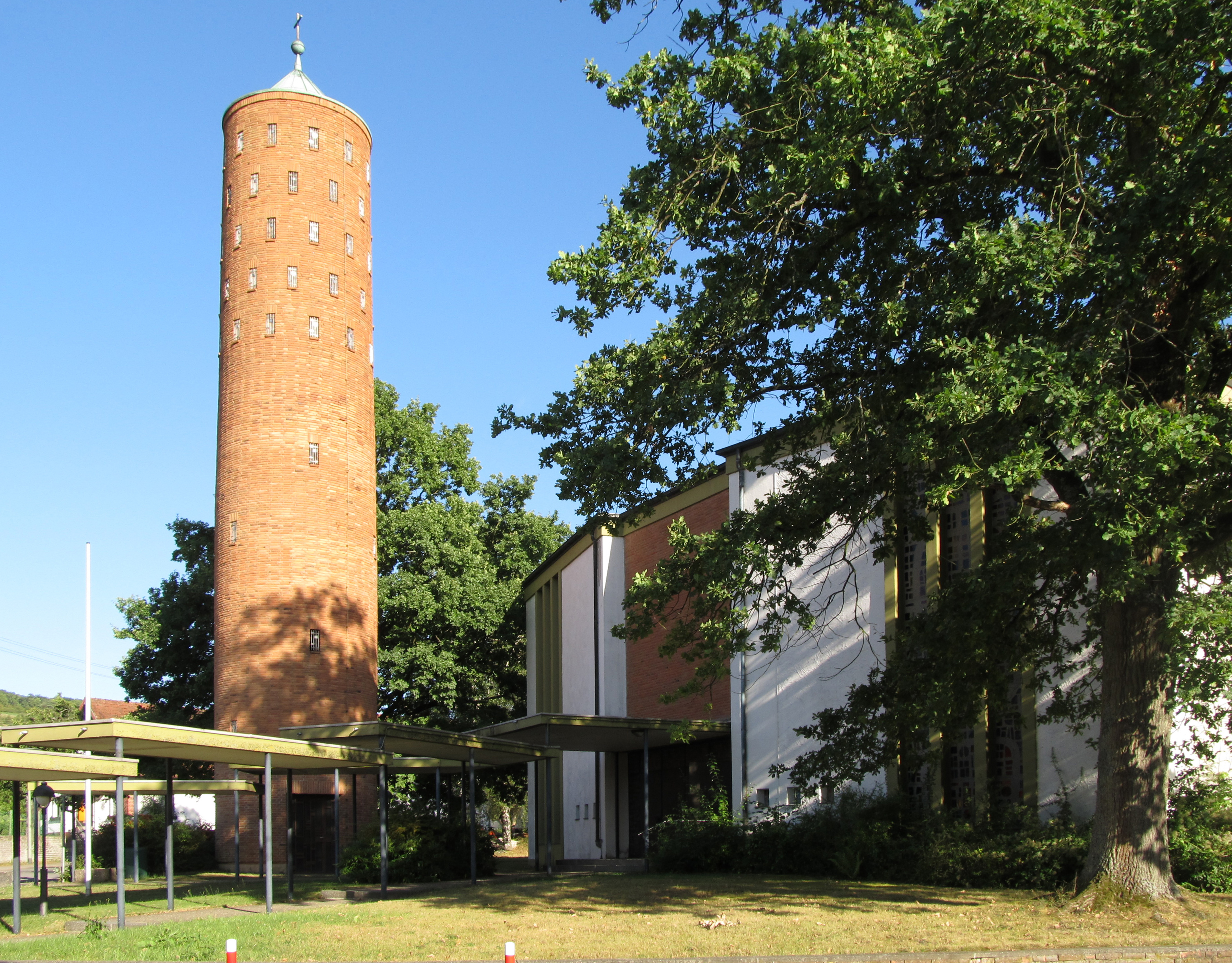 Die katholische Pfarrkirche St. Paulus in Bliesmengen-Bolchen, Gemeinde Mandelbachtal, Saarland